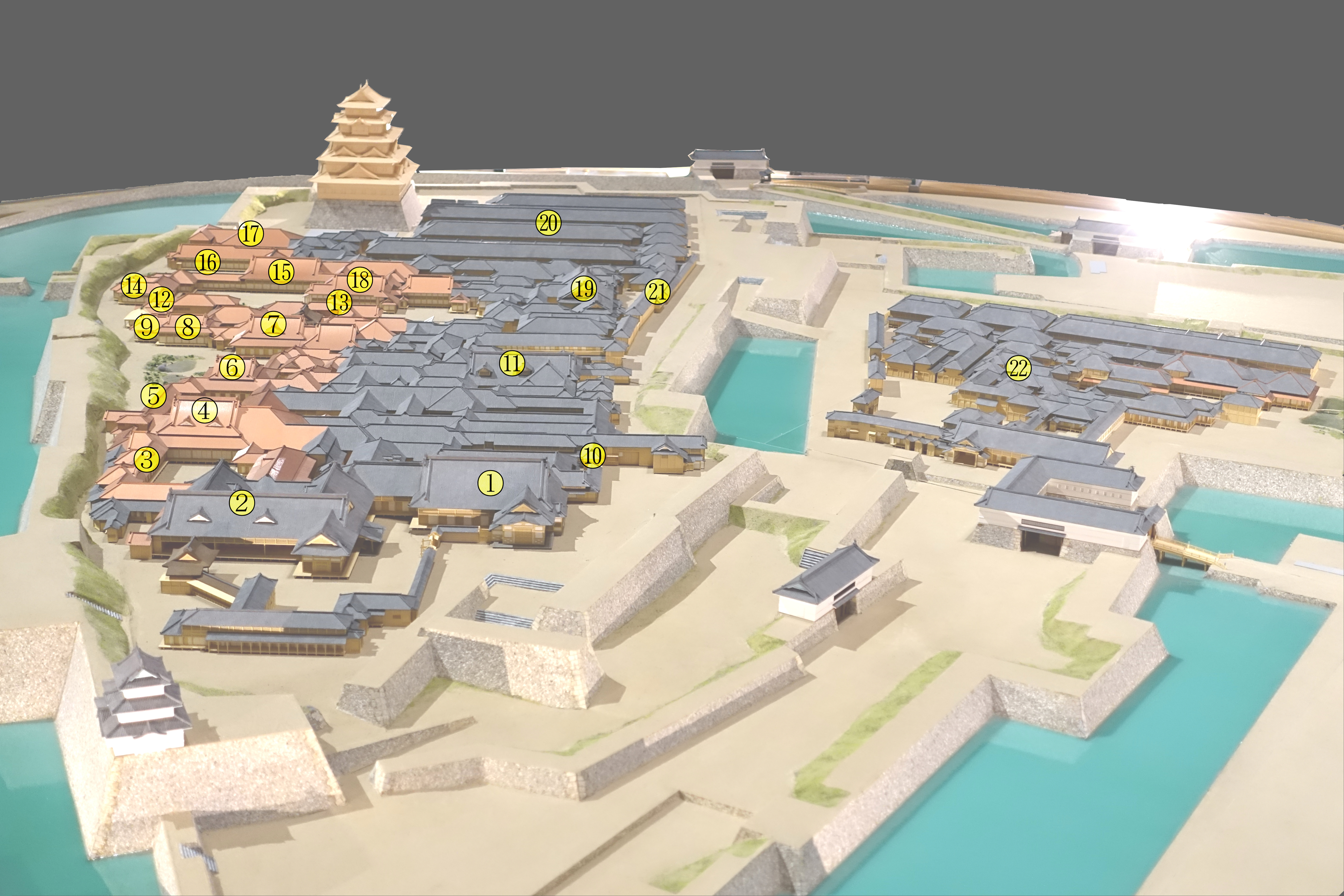 江戸東京博物館所蔵江戸城本丸・二之丸御殿模型にナンバリング